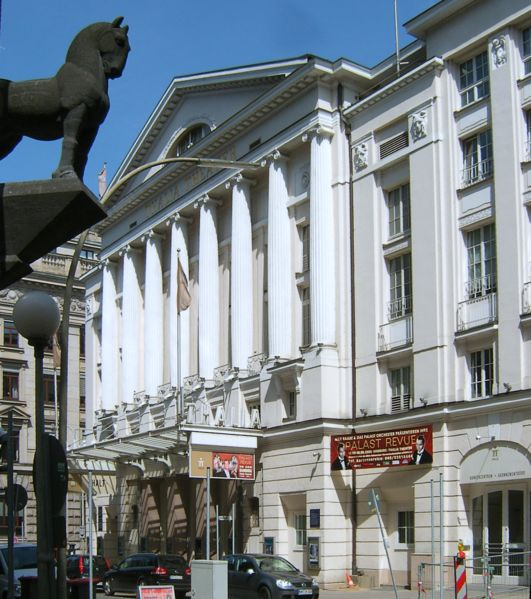 Hamburg, Innenstadt, Thaliatheater This is a photograph of an architectural monument.